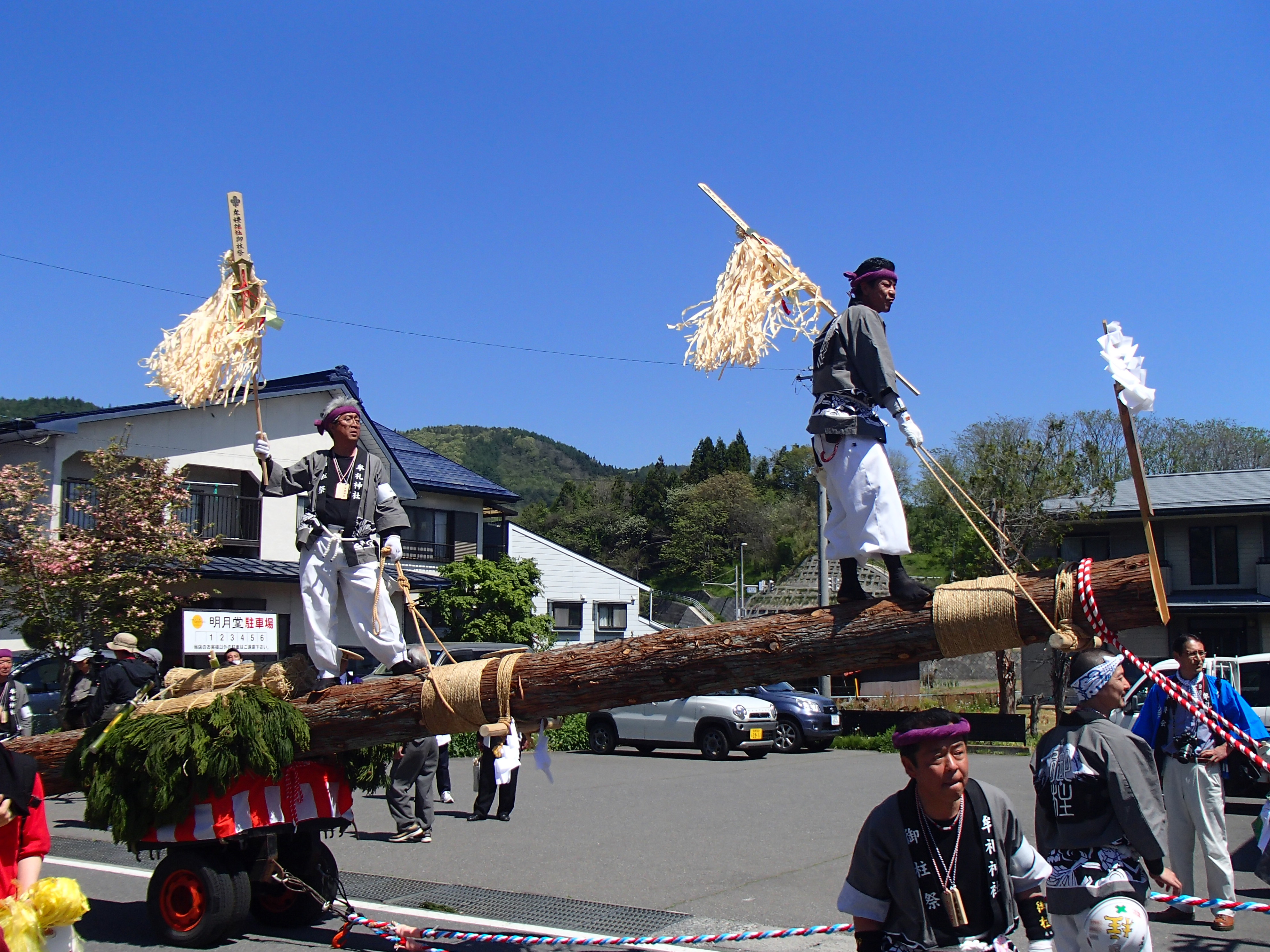 平成28年牟礼神社御柱祭